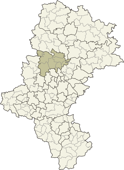 Powiat tarnogórski w województwie śląskim